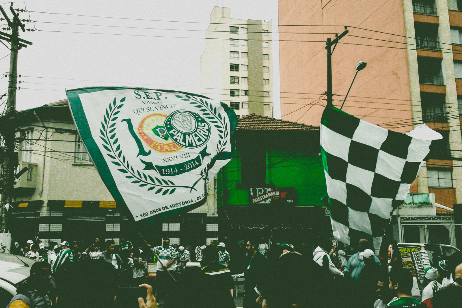 Allianz Parque, São Paulo, SP, Brasil. 06 de setembro de 2015. Facebook || Instagram || Tumblr || Twitter || VSCO Grid